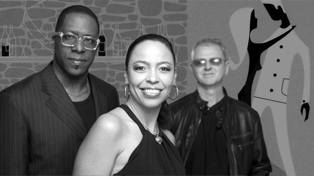 Mitglieder der Band DePhazz. Von links nach rechts: Karl Frierson, Pat Appleton, Pit Baumgartner.